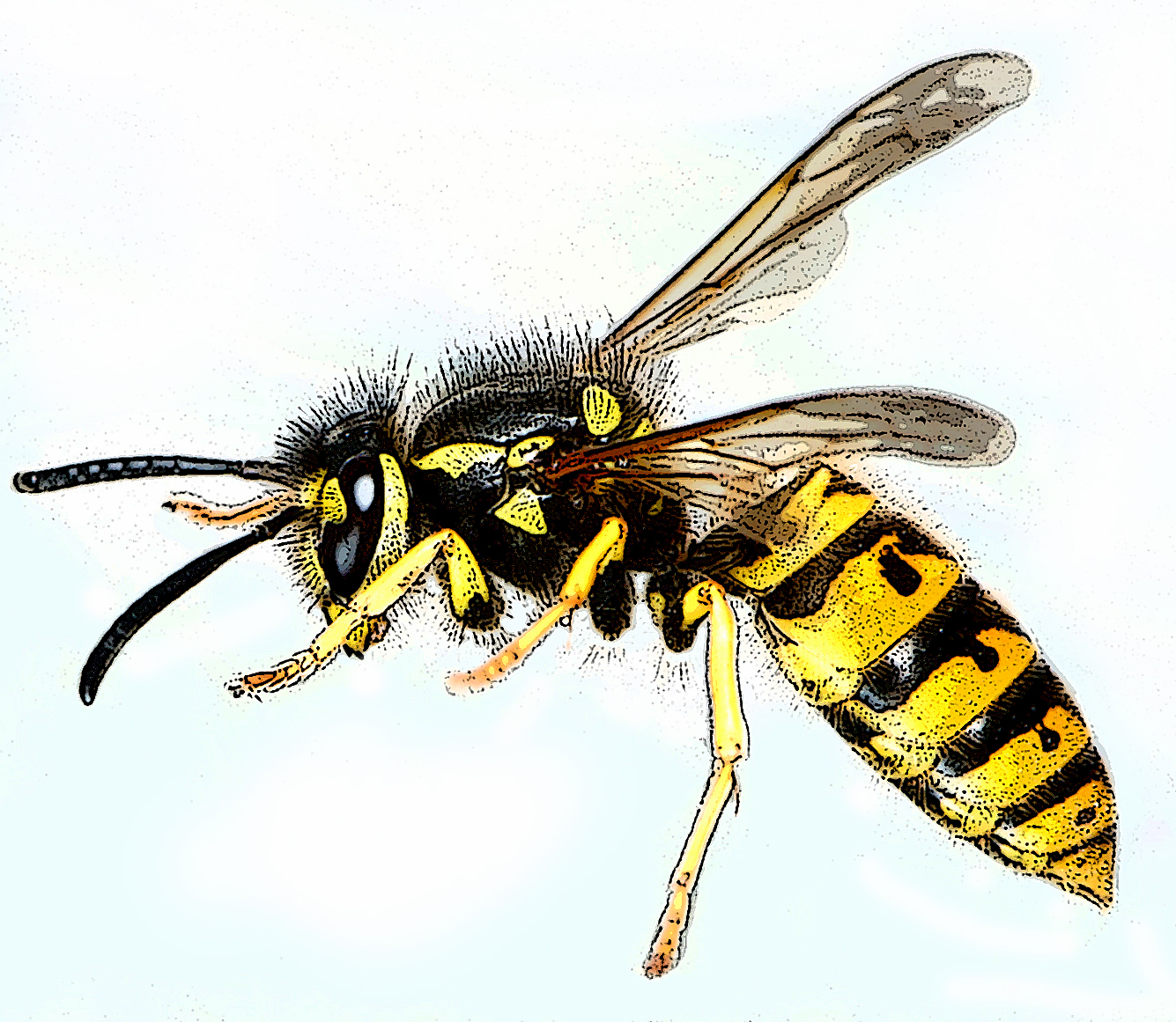 Guêpe Vespula germanica